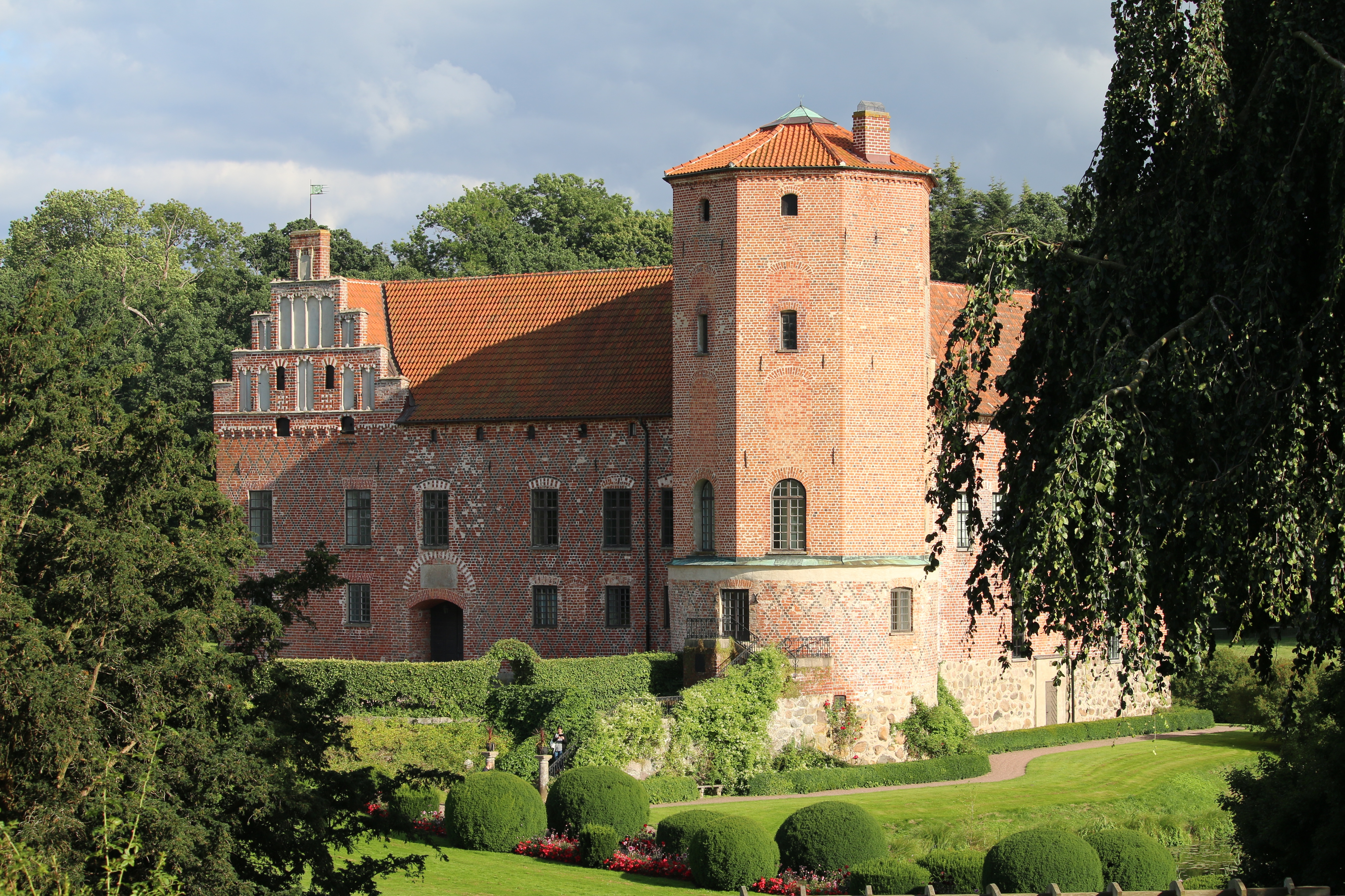 Torups slott 2017